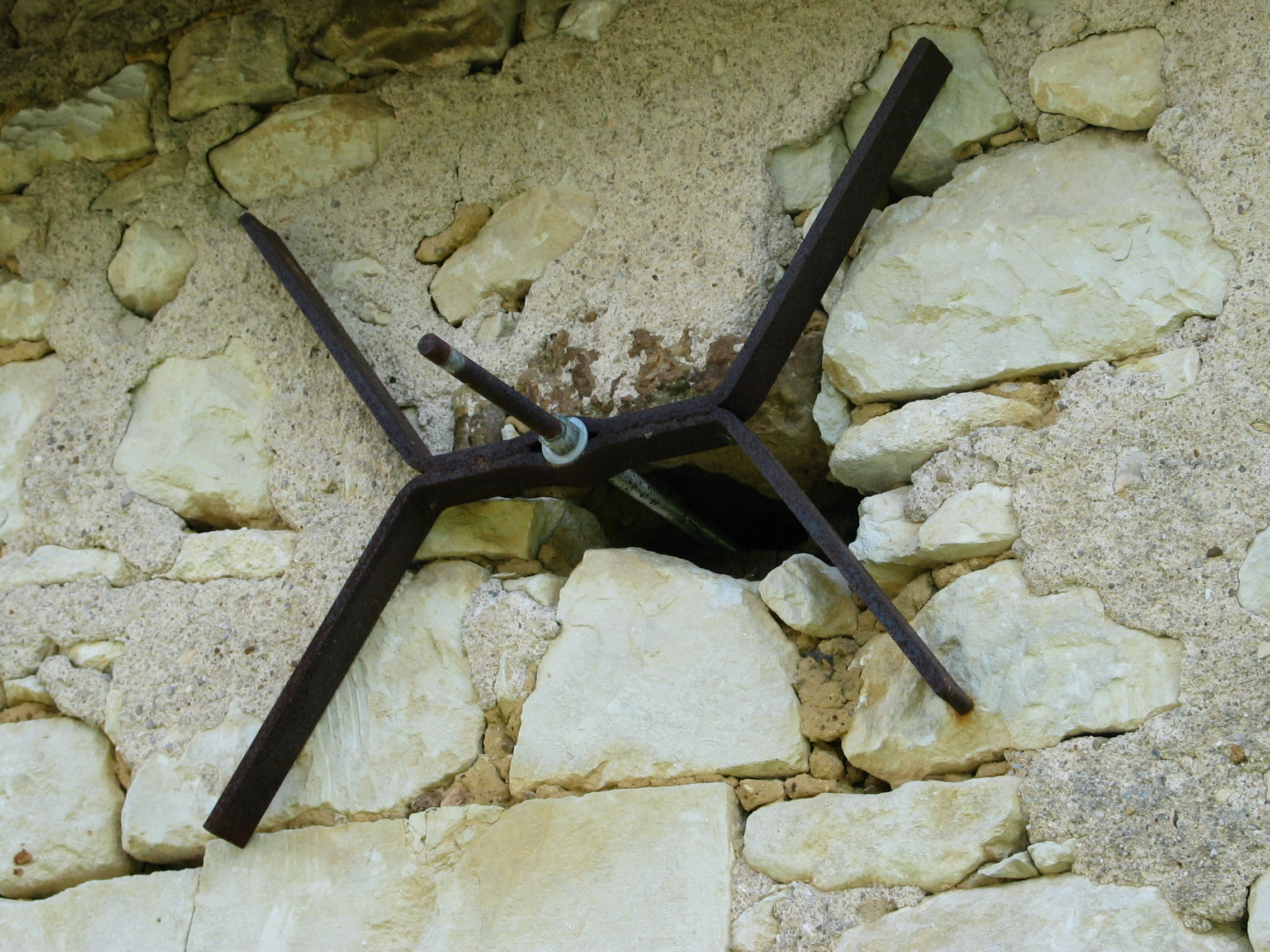 Chaînage métallique des murs en pierre d'une maison ancienne en Touraine (France) avec tirant et ancre.